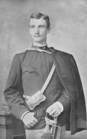 Tadeusz Rozwadowski jako podporucznik w 1886